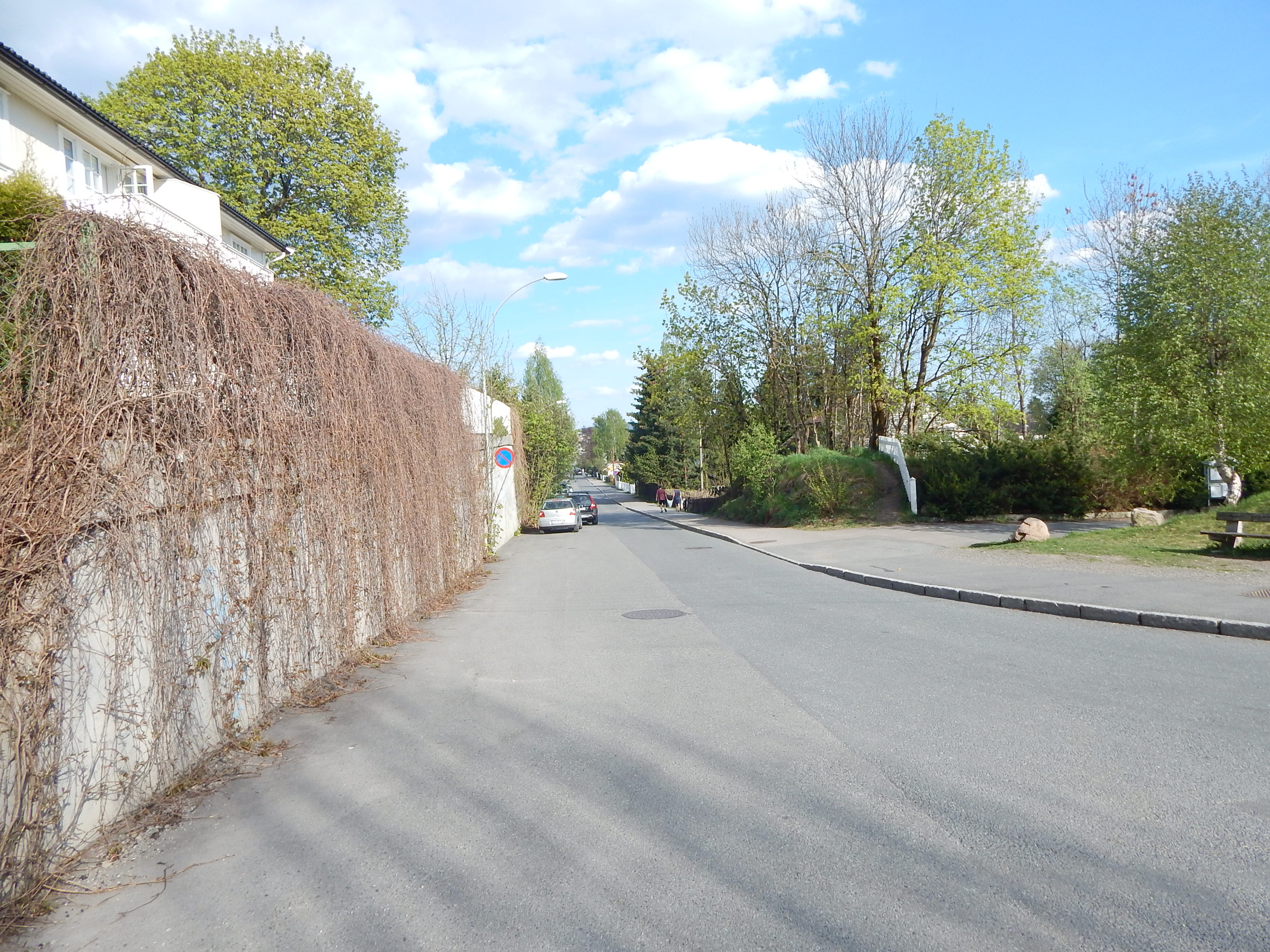 Blåsbortveien sett fra Tåsen